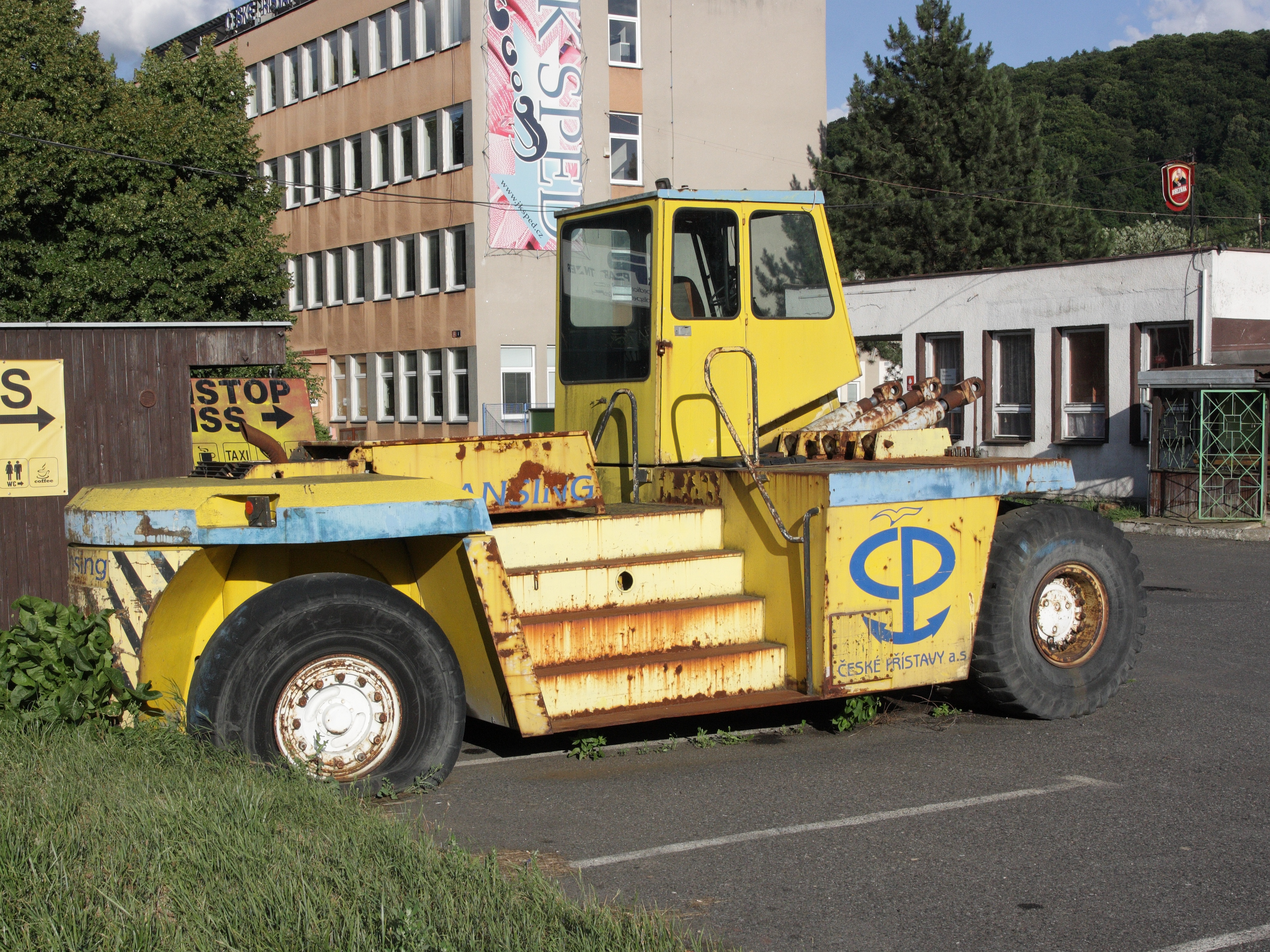 Ústí nad Labem - ul. Přístavní, vyřazený kontejnerový nakladač.